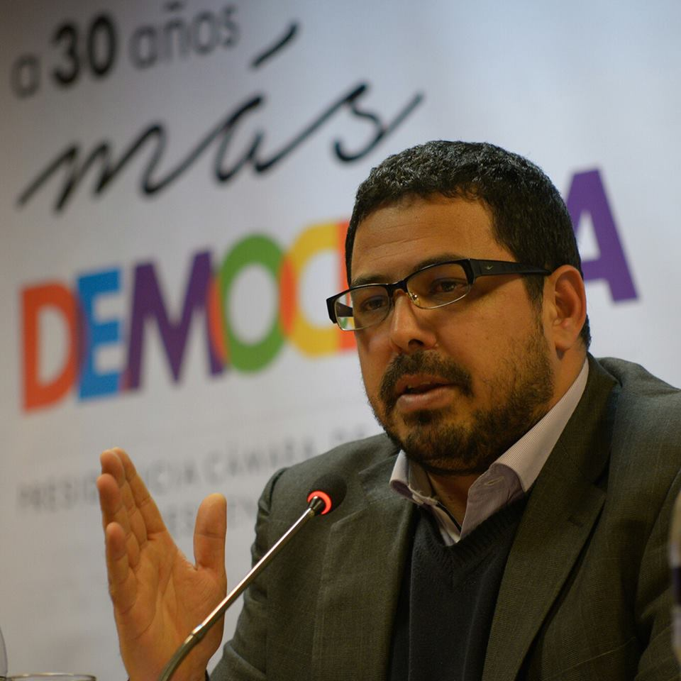 Alejandro Pacha Sánchez, en el marco del Foro "A 30 años, mas democracia", en octubre de 2015.